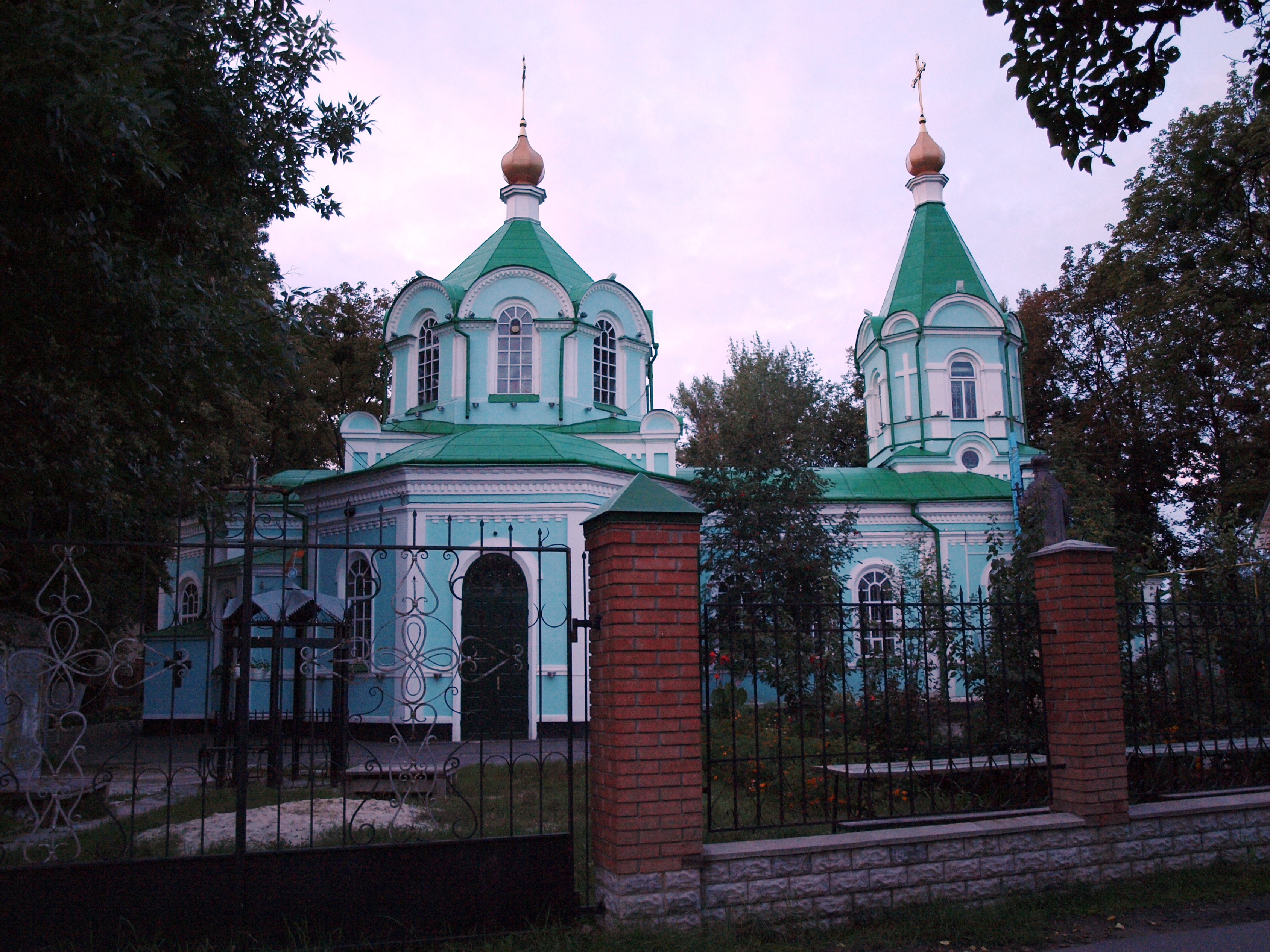 Макарівська церква (Свято-Макарівський кафедральний собор)